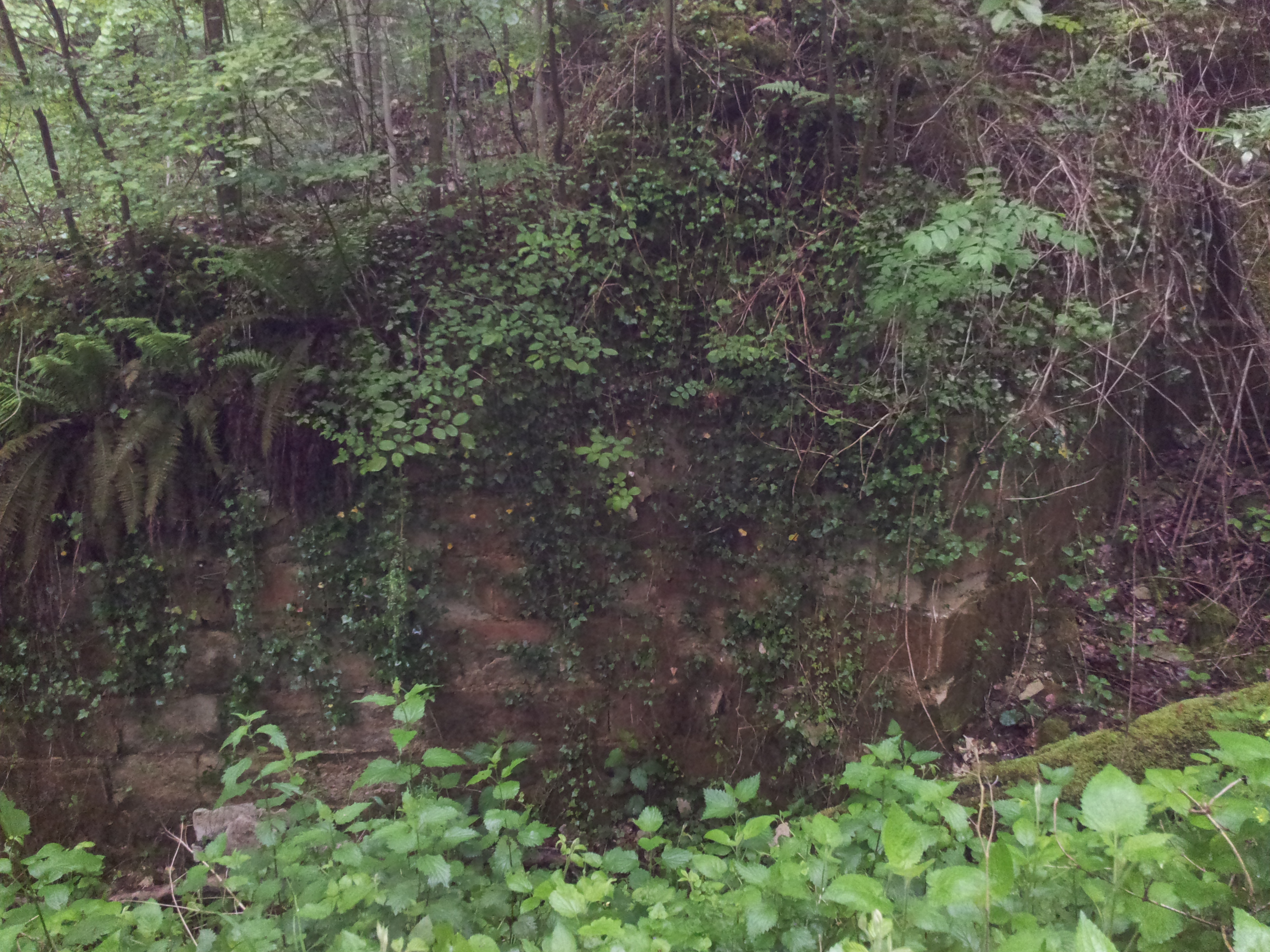 Vestiges sur le flan sud-ouest du château